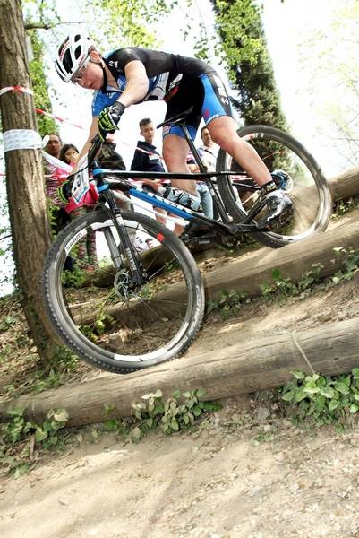 Tanja Žakelj